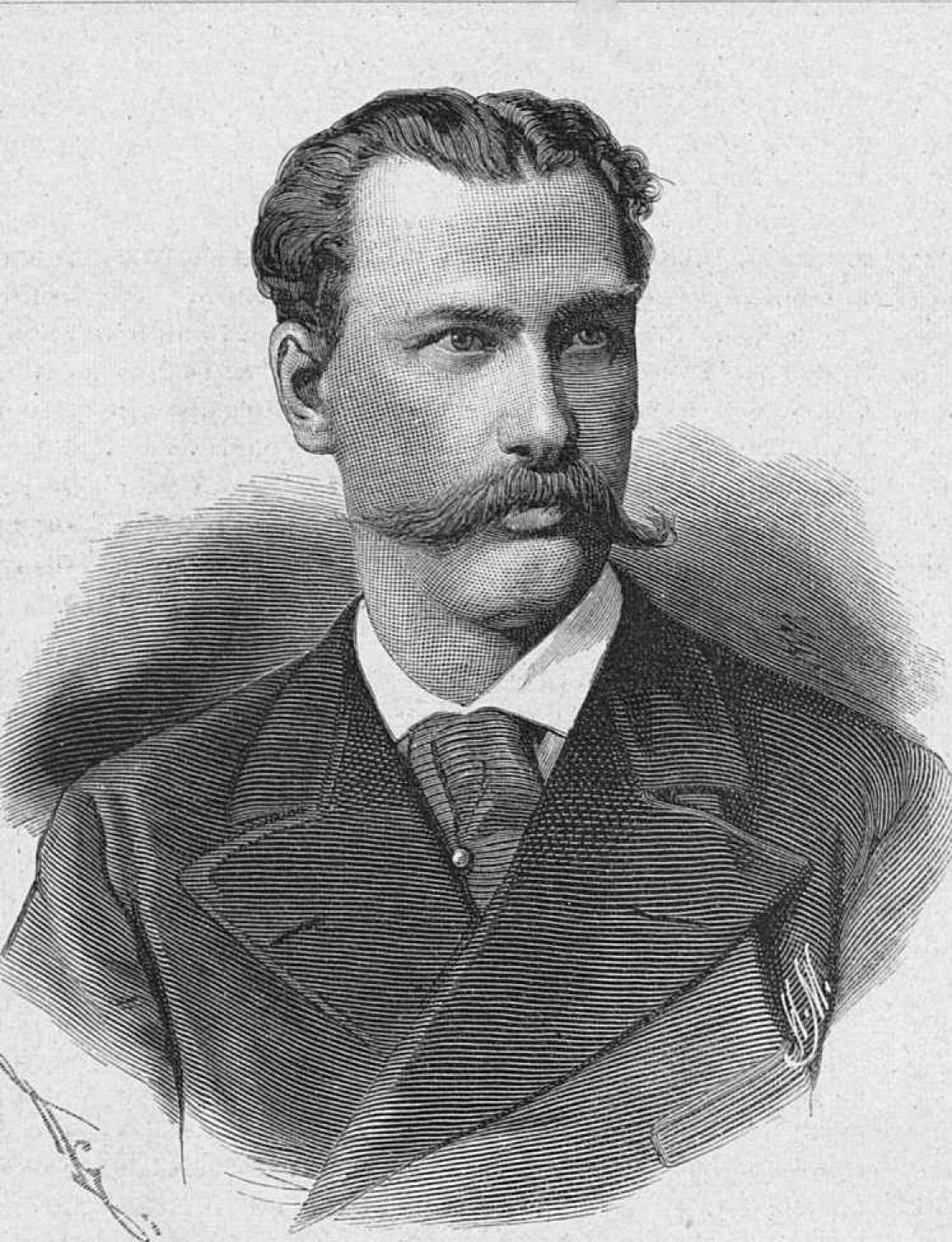 Инженер Михайловский Константин Яковлевич